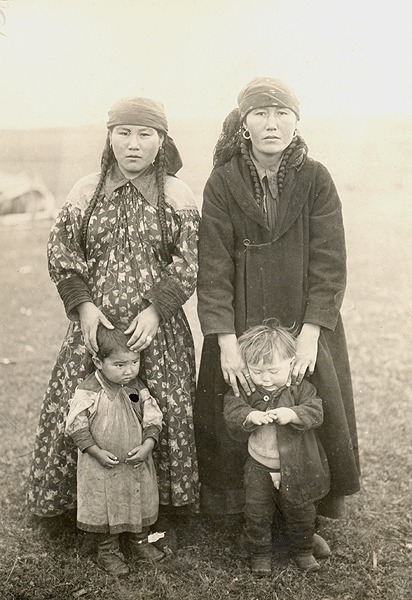 Фото, сделанное С.Д. Майнагашевым